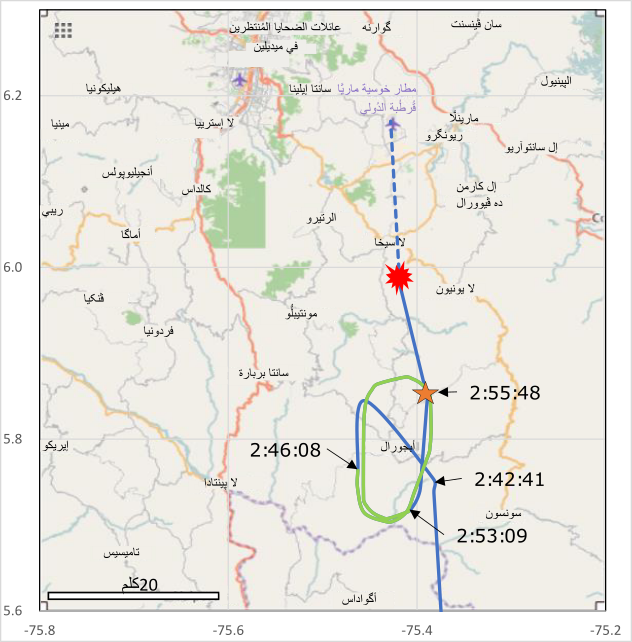 مسار رحلة خطوط لاميا الجوية 2933 في حلقة دائرية خلال الدقائق الخمسة عشر الأخيرة. تشير النجمة البرتقالية إلى المكان الذي فقد فيه إرسال نظام المراقبة التلقائي "ADS-B". وتشير علامة الانفجار الحمراء إلى موقع الحادث.